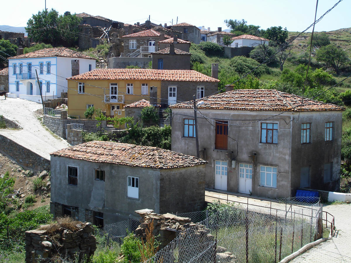 Το χωριό Αγρίδια (Tepeköy). Η φωτογραφία ανήκει σε εμένα και βρίσκεται στο άρθρο του blog μου